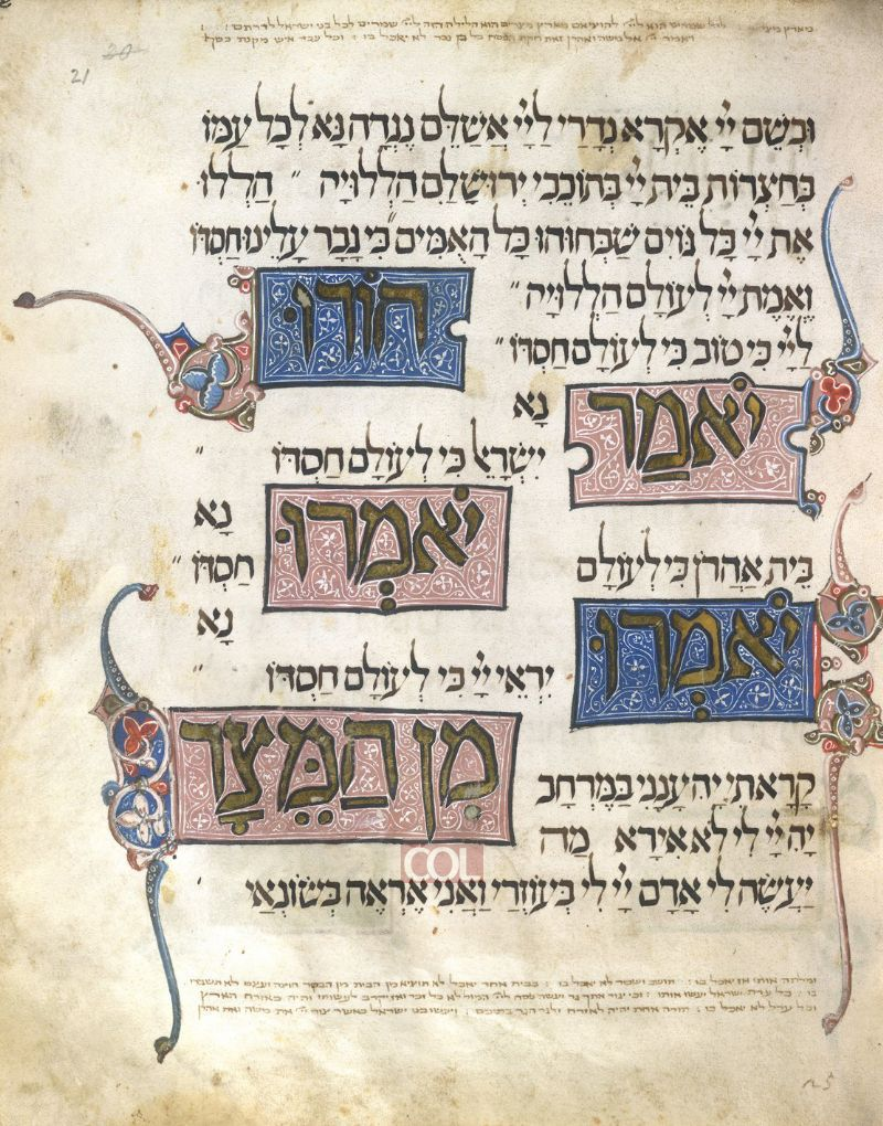 הגדת שאלתיאל או הגדת שאלתיאל חן היא הגדה של פסח מאוירת עם עיטורי זהב הכתובה על גבי קלף, שנכתבה בספרד במאה ה-14. הייתה ברשותה של משפחת שאלתיאל - גרסיאן - חן מברצלונה, צאצאי זרובבל בן שאלתיאל, ראש הגולה בבבל. ההגדה מכונה בפי החוקרים "הגדת האח להגדת ריילנדס" בשל הדמיון הרב בין השתיים, לא ברור האם אחת הועתקה מהשנייה או ששתיהן הועתקו מהגדה שלישית שאינה בנמצא. נמצאת בספרייה הבריטית.